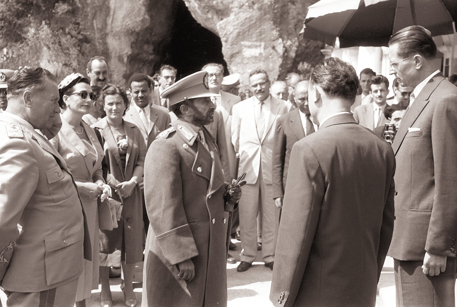 Josip Broz Tito in cesar Haile Selassie v Kopru.